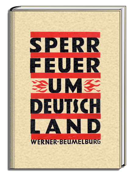 Scan des im Besitz der Familie befindlichen Buchtitels von 1929